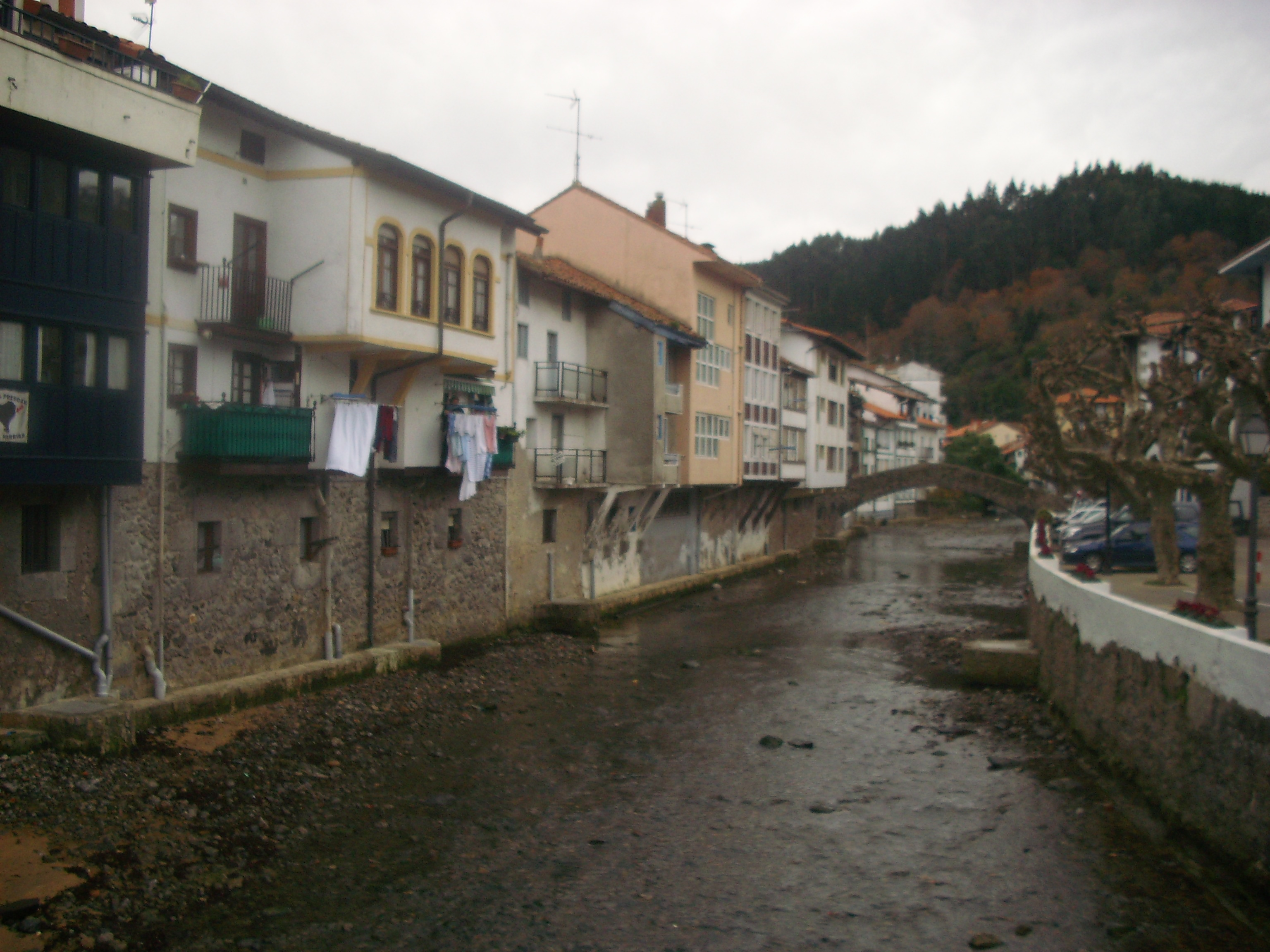 Ea herria banatzen duen izen bereko ibaia herritik igarotzen.